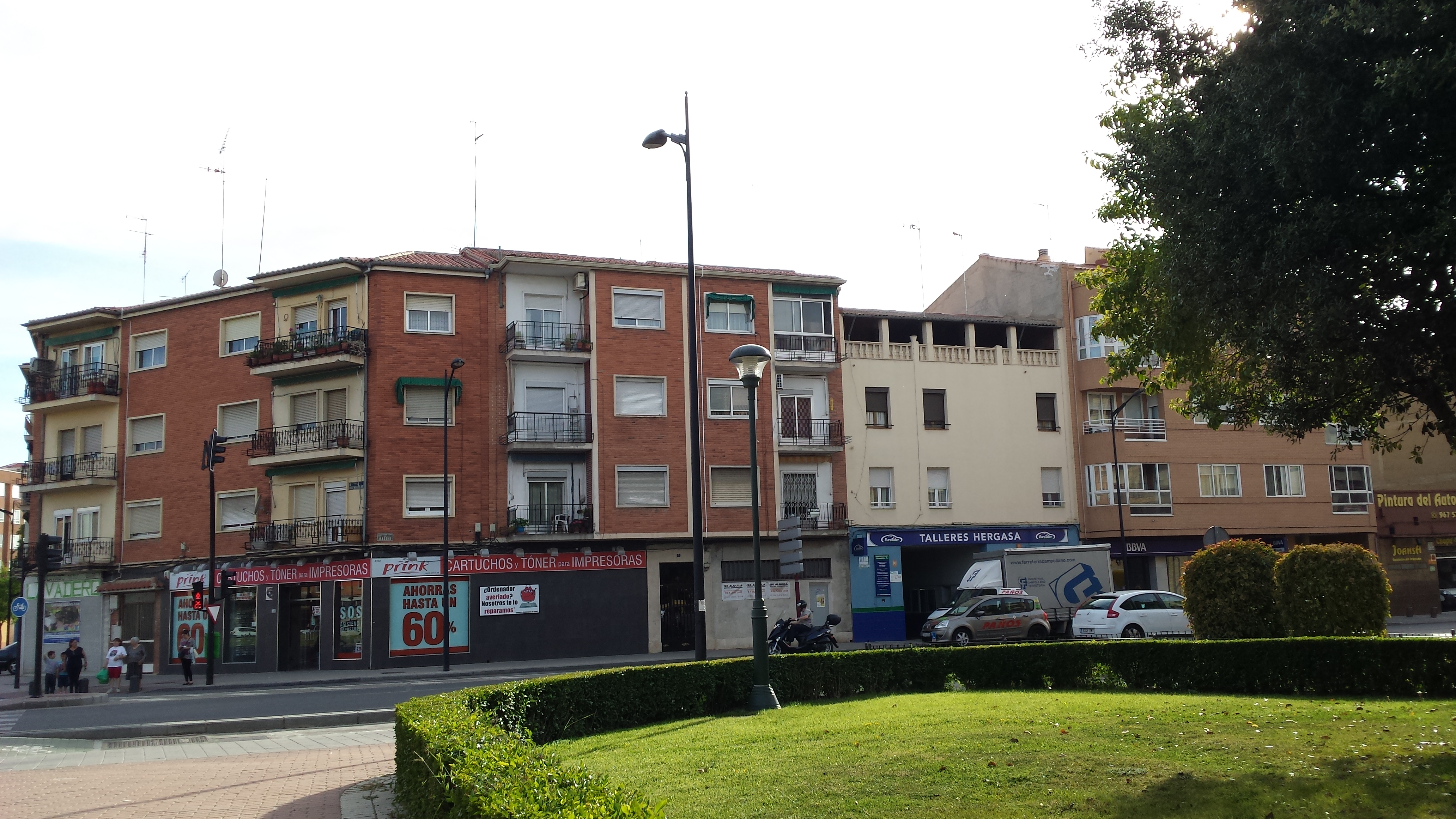 Barrio Cañicas. Albacete. Rotonda Fuente de la Tamos. Avenida Gregorio Arcos. Carretera de Madrid